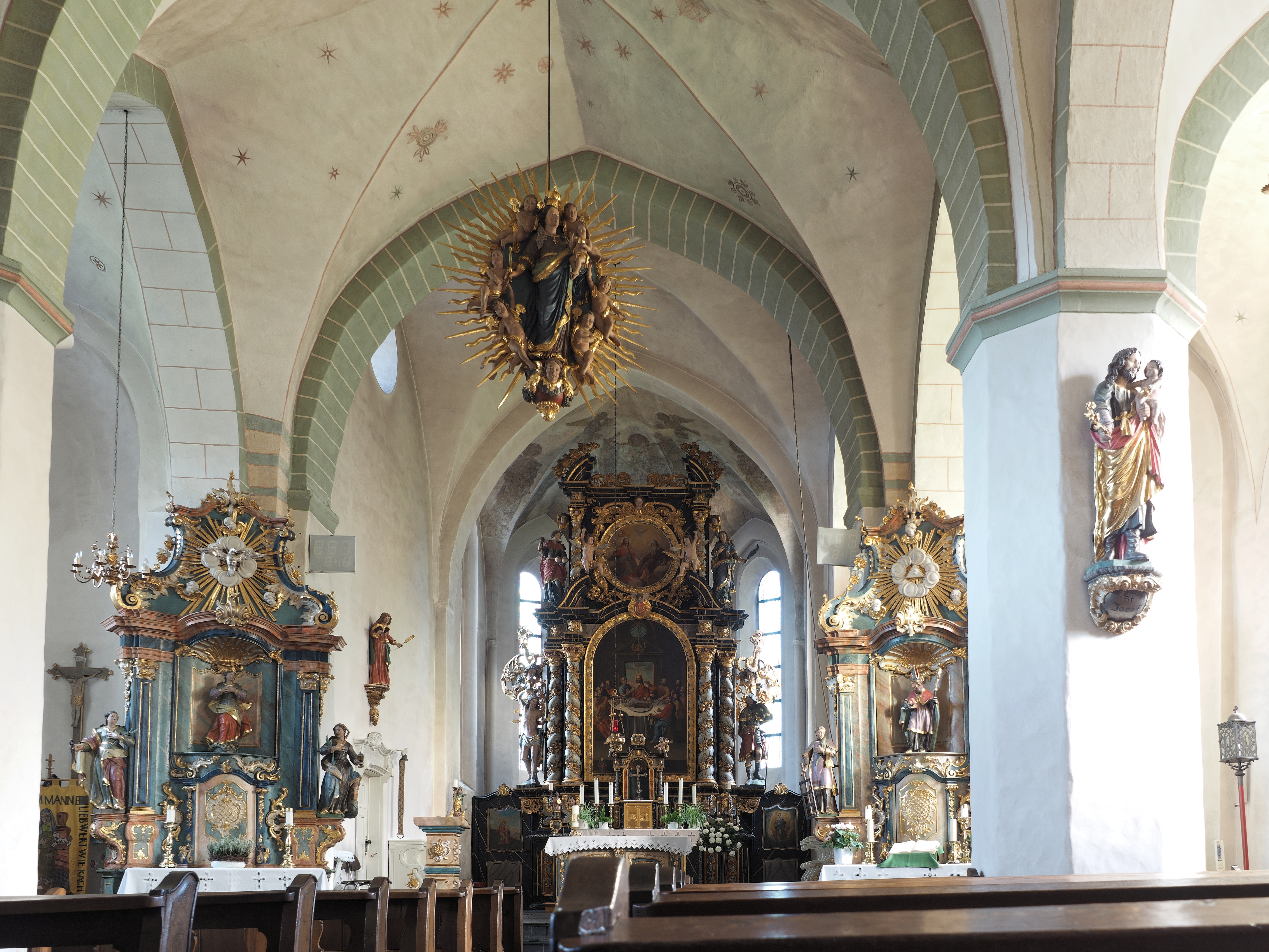 Der Innenraum der katolischen Kirche St.-Johannes-Evangelist in Meschede-Eversberg. This is a photograph of an architectural monument.